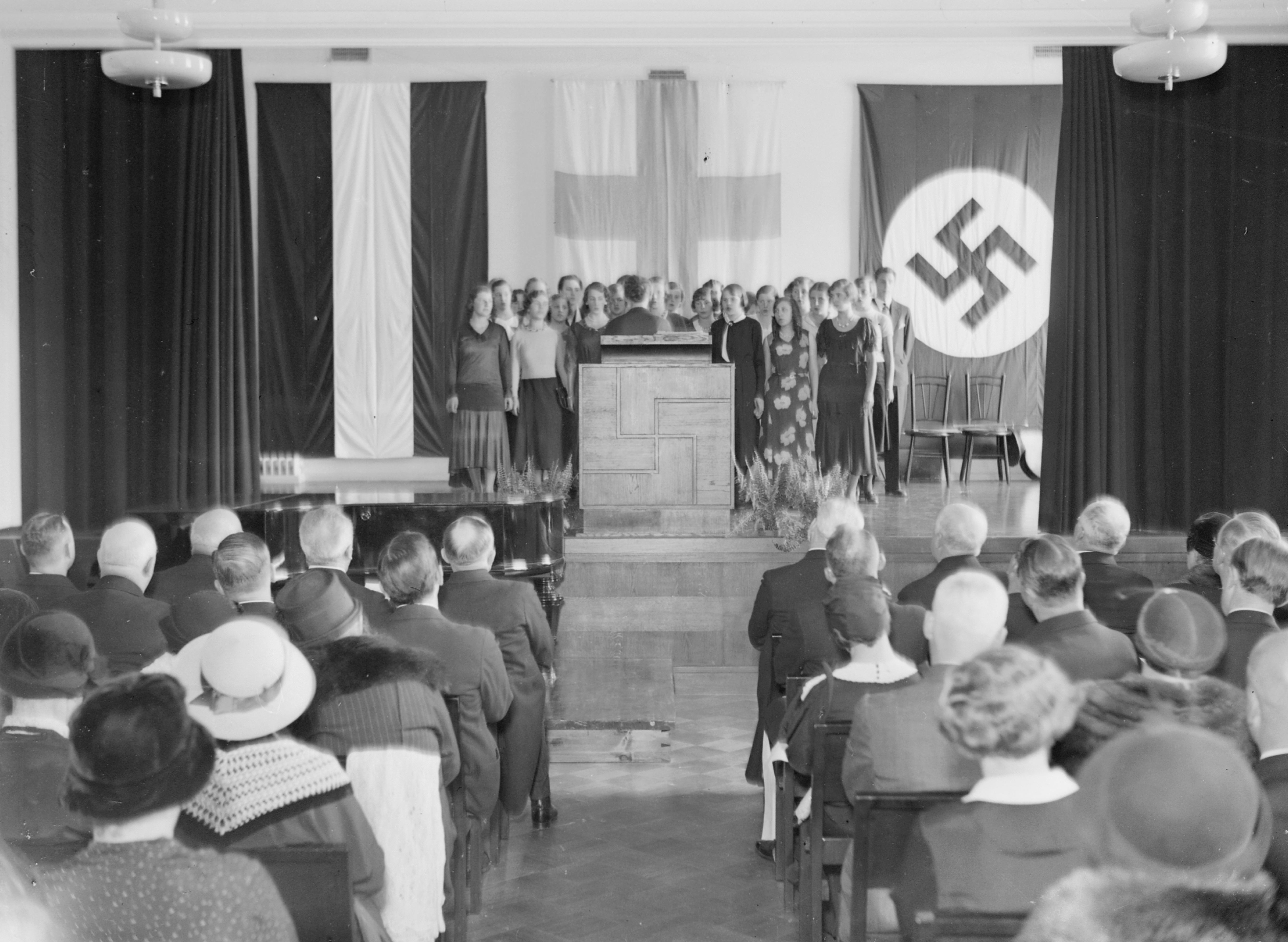 Deutscher Schule vihkijäiset syyskuussa vuonna 1933 osoitteessa Malminkatu 14, Helsinki.